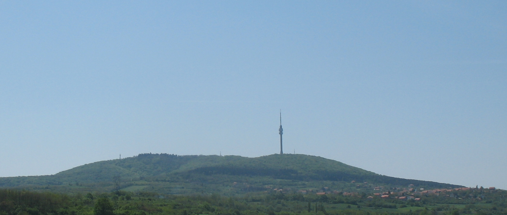 View on Avala from E-75, Belgrade, Serbia.